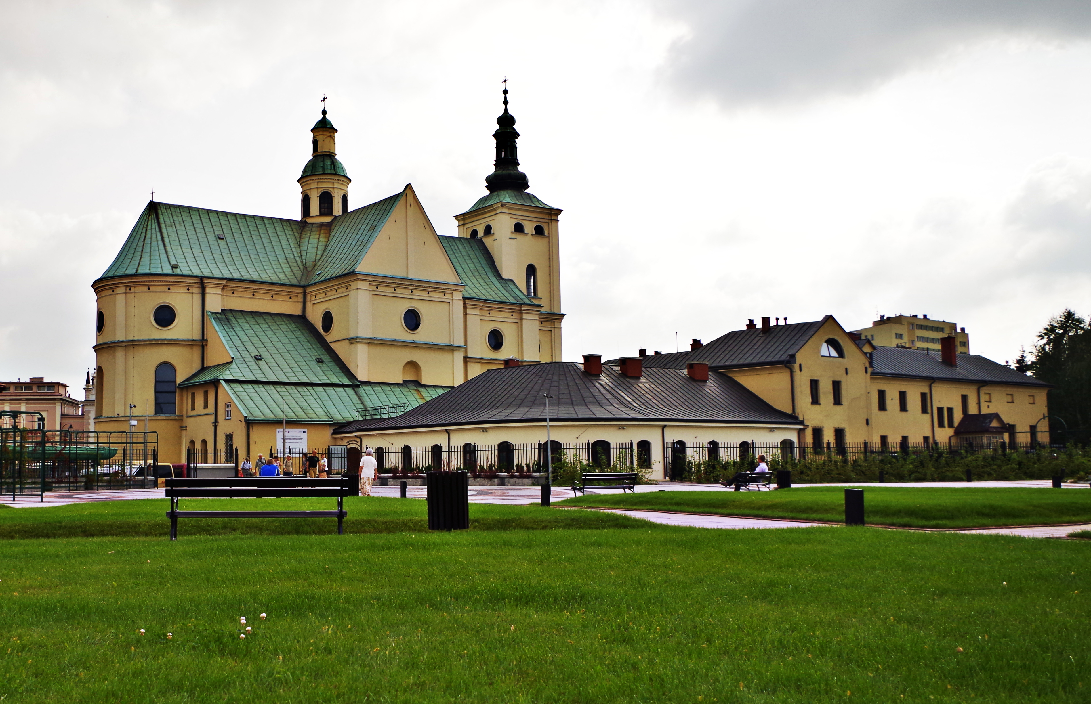 Rzeszów, zespół klasztorny bernardynów, 1610-1627